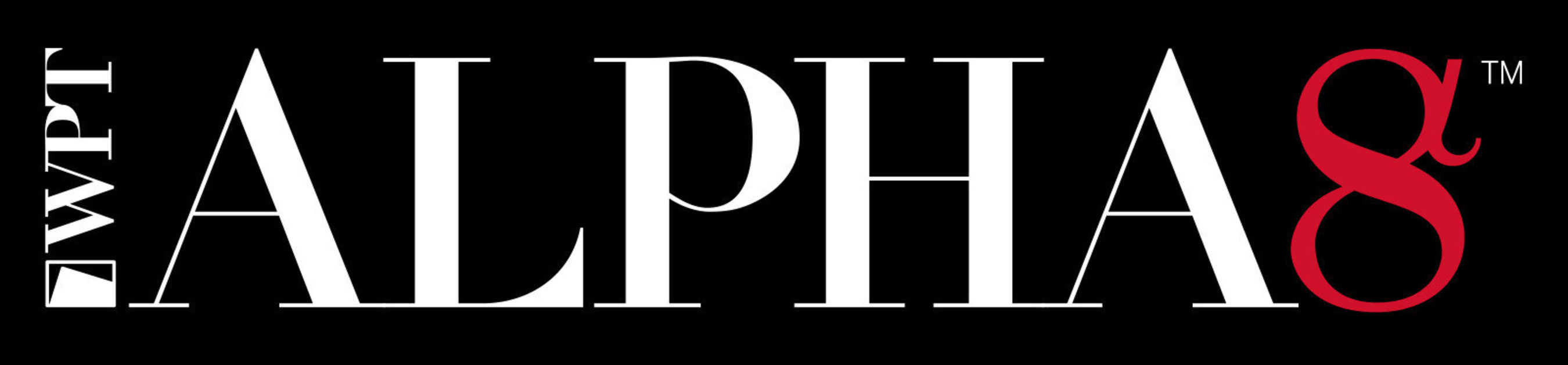 Logo der WPT Alpha8